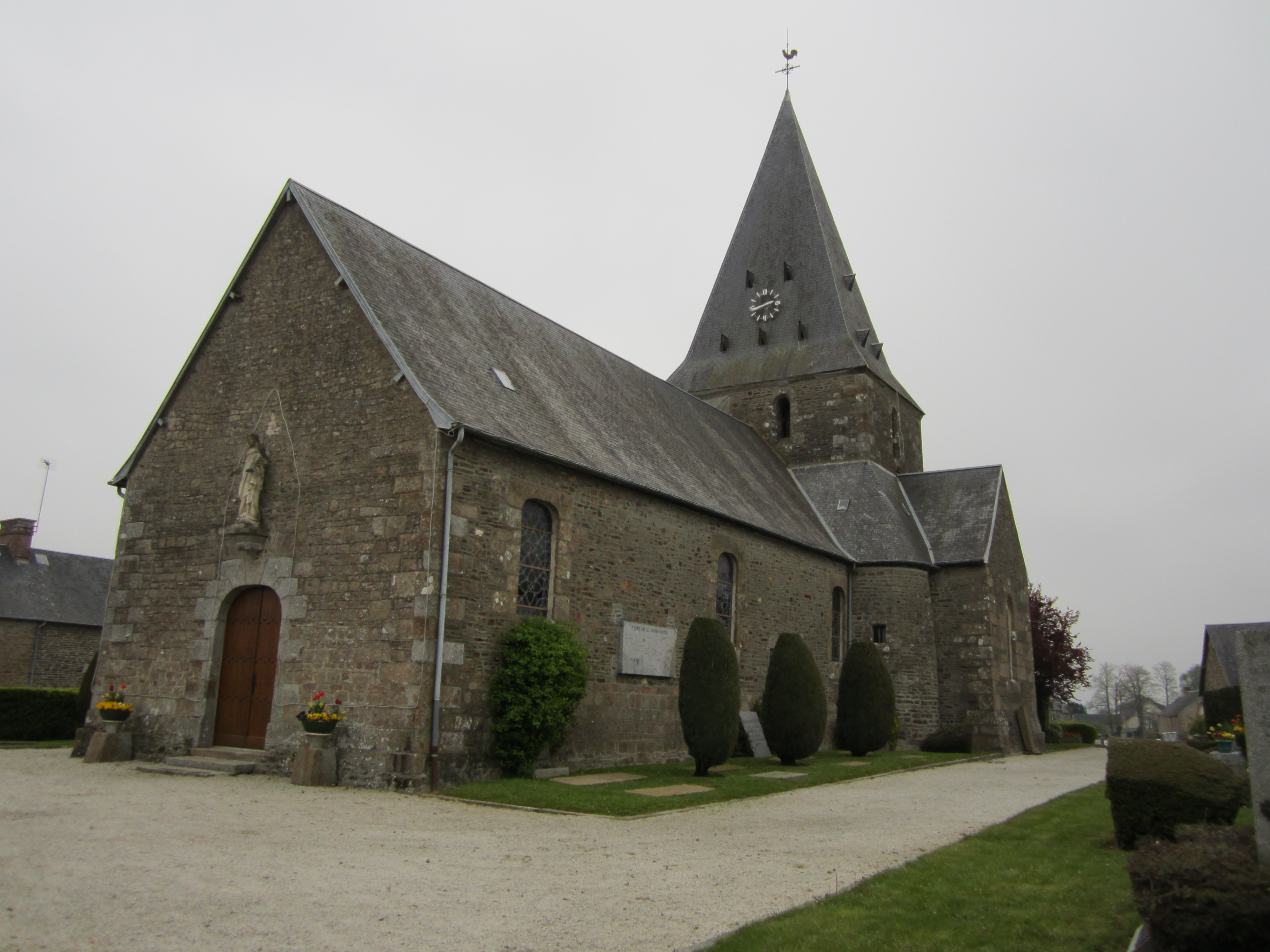 église Sainte-Trinité de La Croix-Avranchin